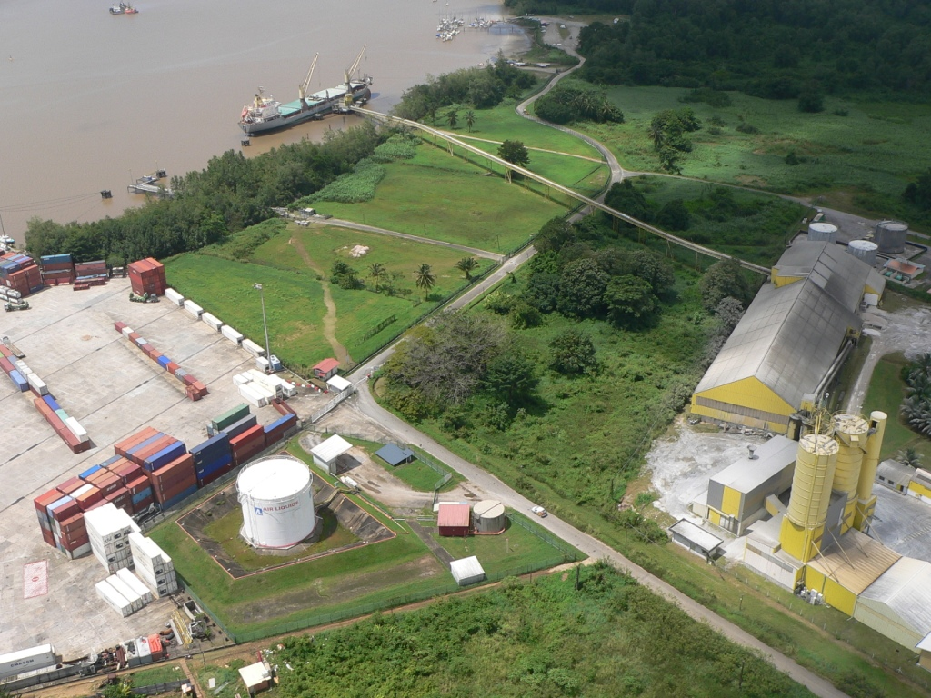 Grand port maritime de guyane - Dégrad des cannes